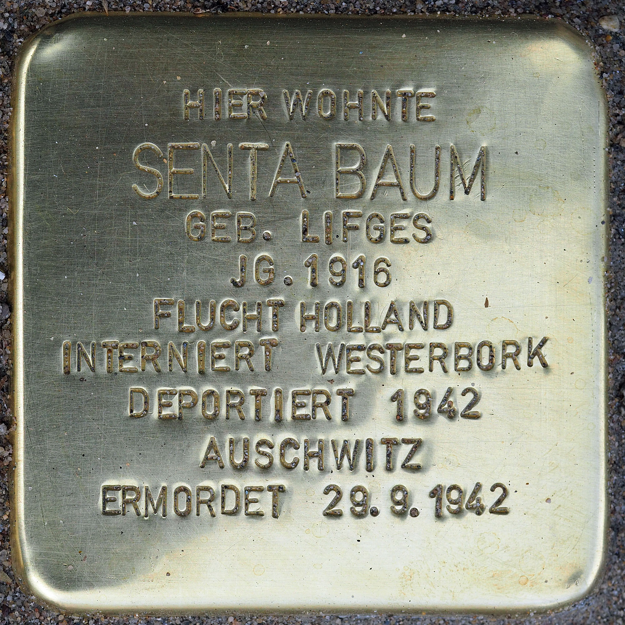 Stolpersteine Suechteln: Baum, Senta